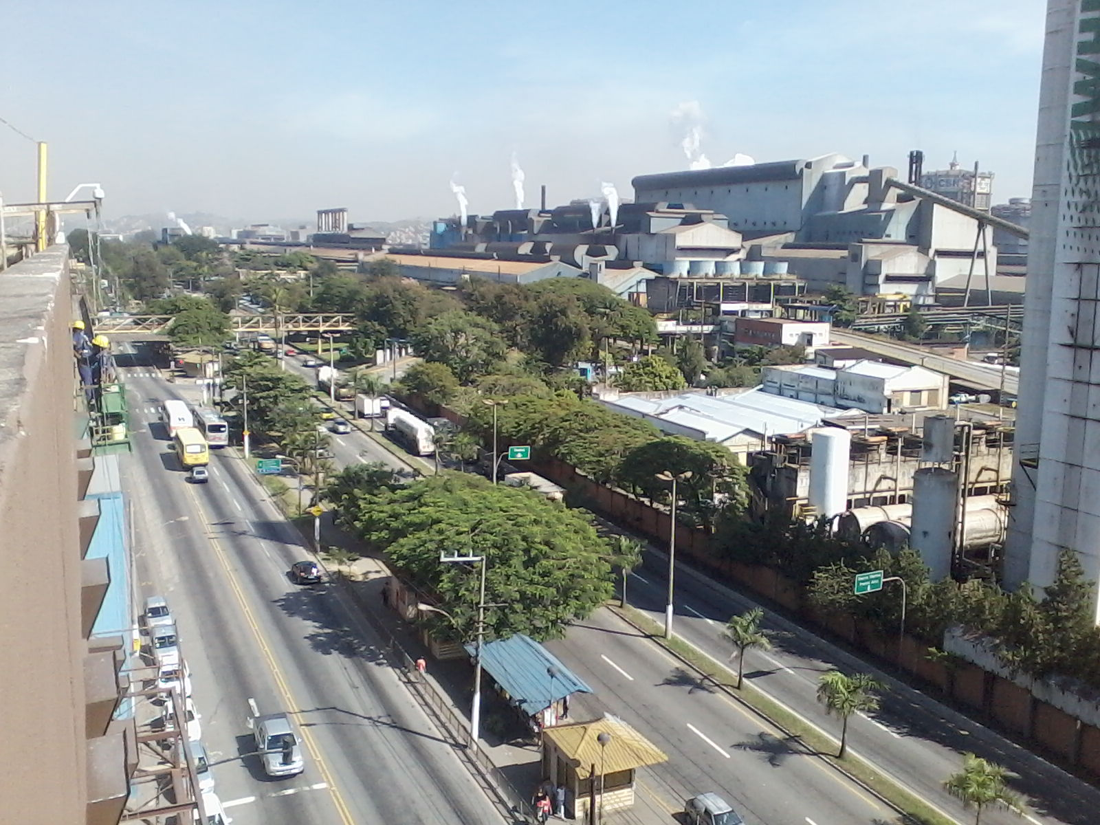 Vista panorâmica do Centro da cidade de Volta Redonda, Rio de Janeiro, Brasil.